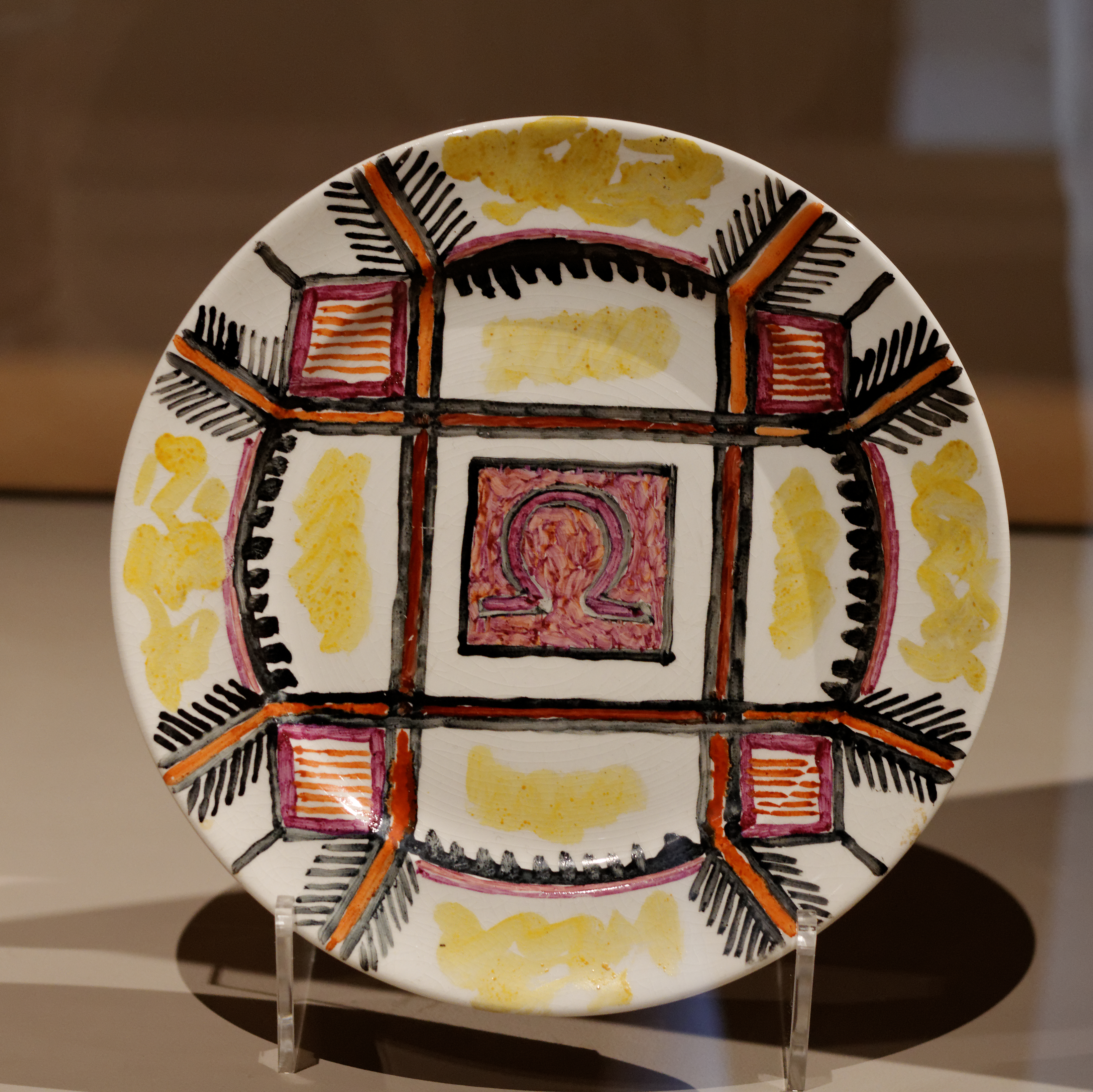 Assiette avec design géométrique. Omega Workshops, vers 1913. Attribué à Duncan Grant (1885-1978) ou Roger Fry (1866-1934). Courtauld Institute of Art Native nameCourtauld Institute of ArtParent institutionUniversity of LondonLocationLondonCoordinates51° 30′ 39″ N, 0° 07′ 02″ W Established1932 / 1 November 2002Web page control : Q734266 VIAF: 129882217 ISNI: 0000 0004 1936 850X ULAN: 500234126 LCCN: n50045627 GND: 36827-1 WorldCat institution QS:P195,Q734266